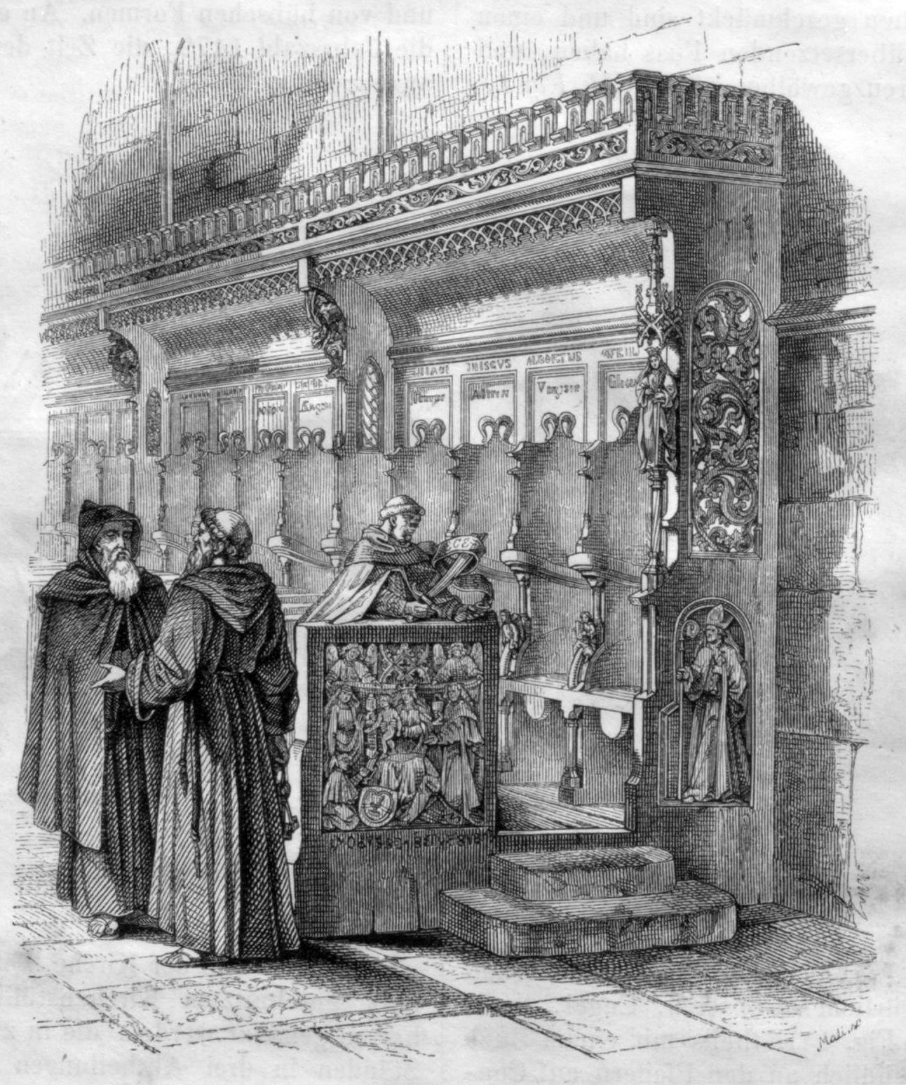 Hospitalkirche in Stuttgart, Chorgestühl, 1855. – Bis zum Zweiten Weltkrieg in der Hospitalkirche, nach dem Wiederaufbau in der Leonhardskirche (Stuttgart).